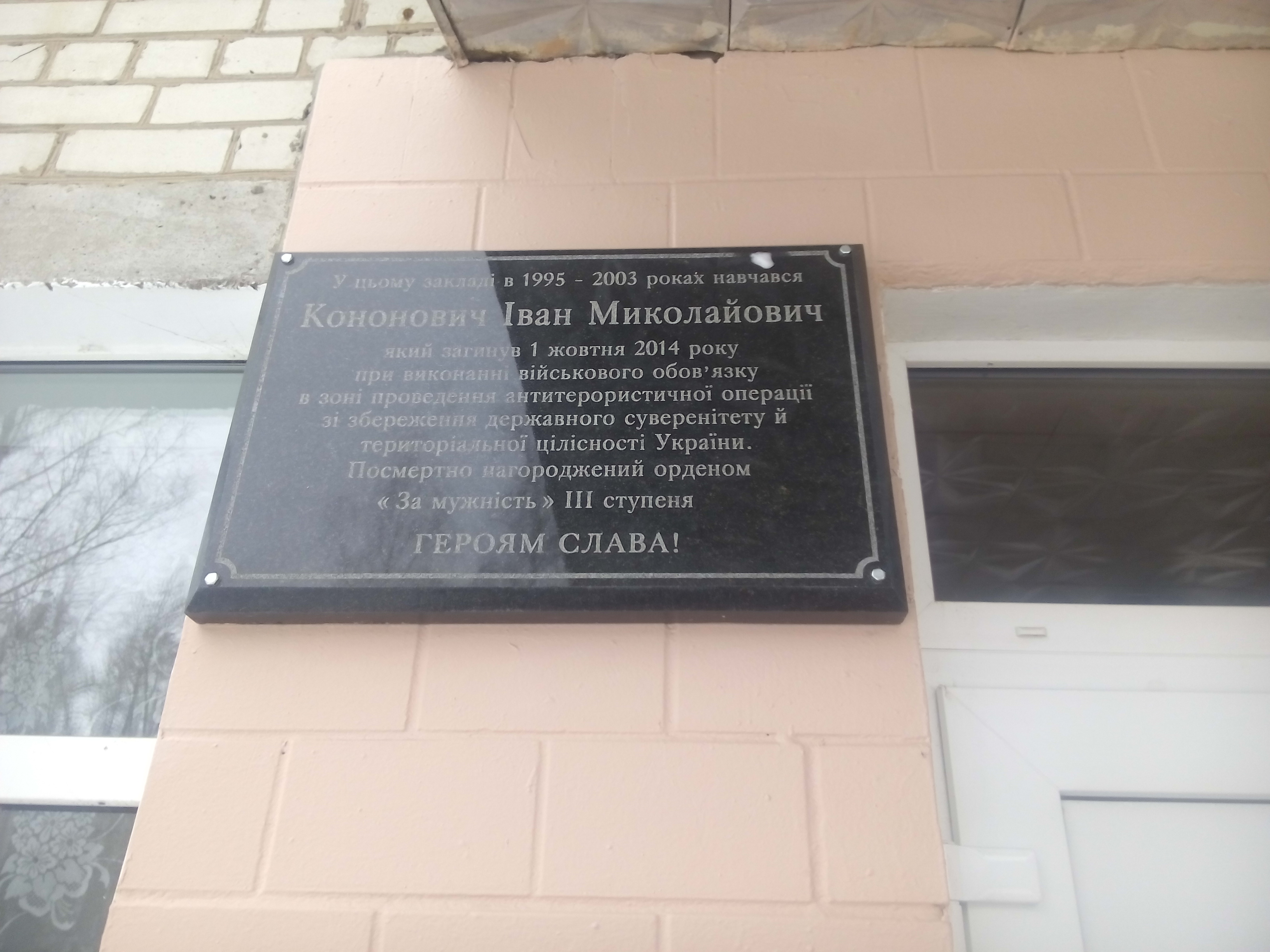 Ліцей 22 Чернігова у 2017